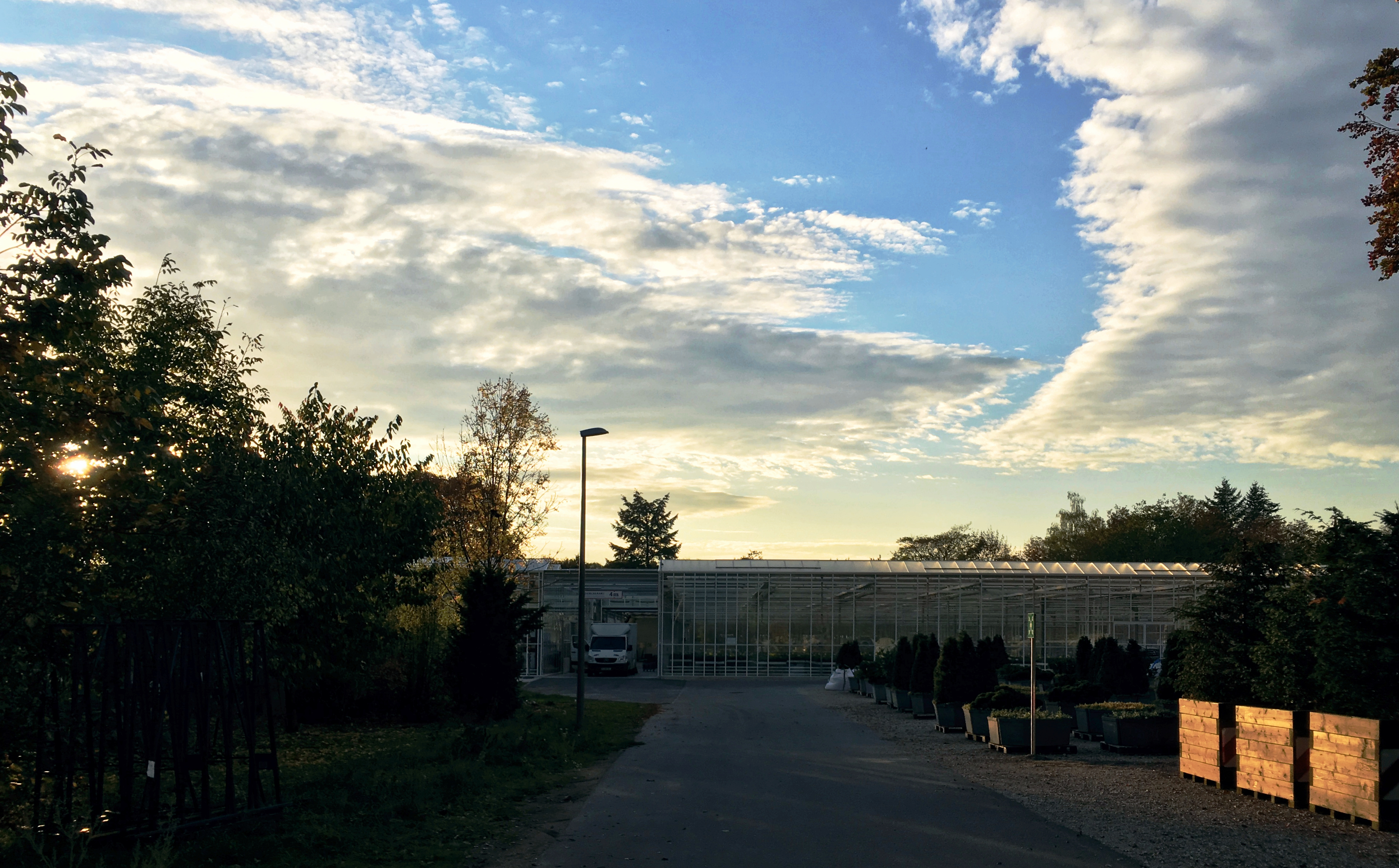 Noris Inklusion auf dem Areal des ehemaligen